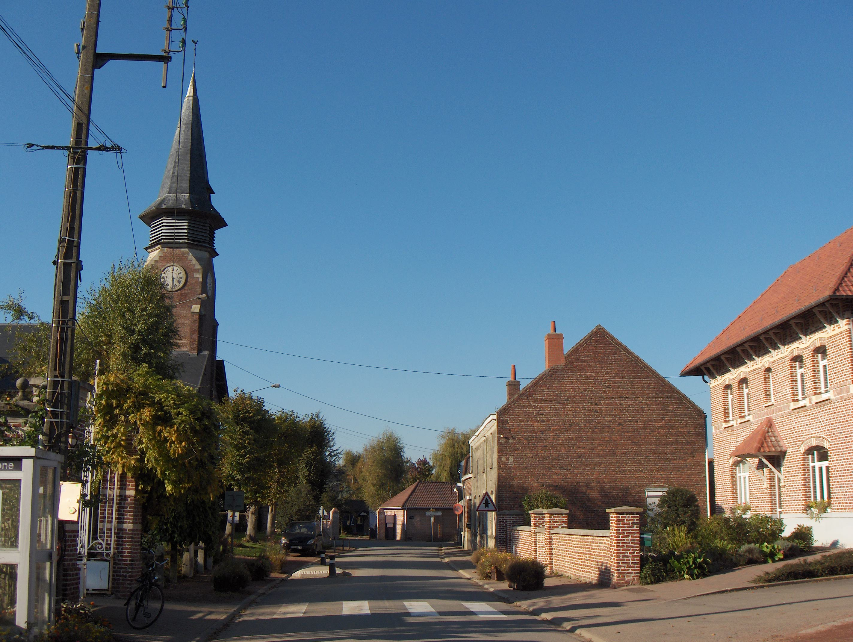 Le Maisnil (France, dept. Nord), centre du village, rue de l'Eglise, vue vers le nord, avec l'église Saint-Pierre à gauche et l'ancienne presbytère à droite.